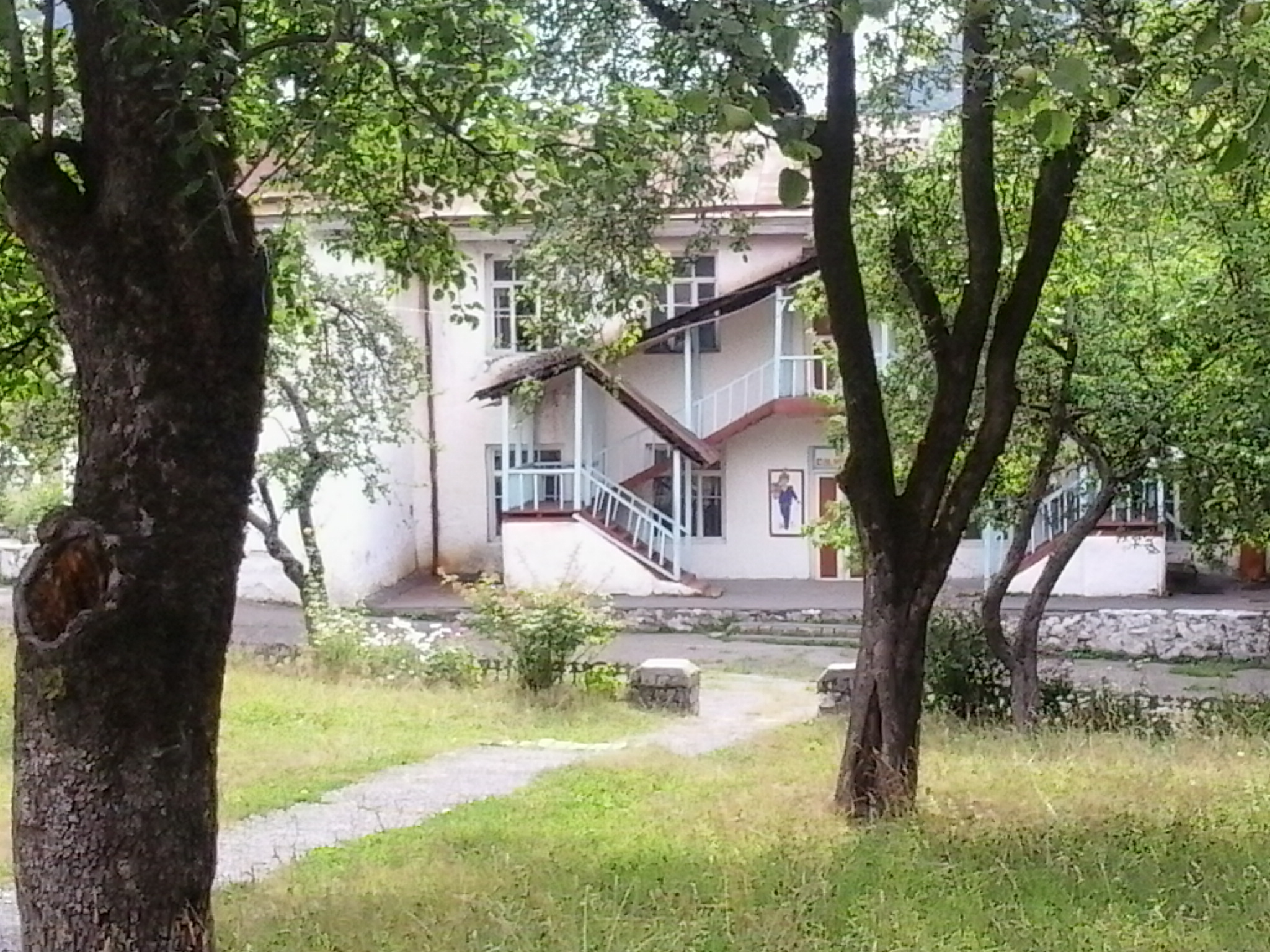 İlisu məktəbi